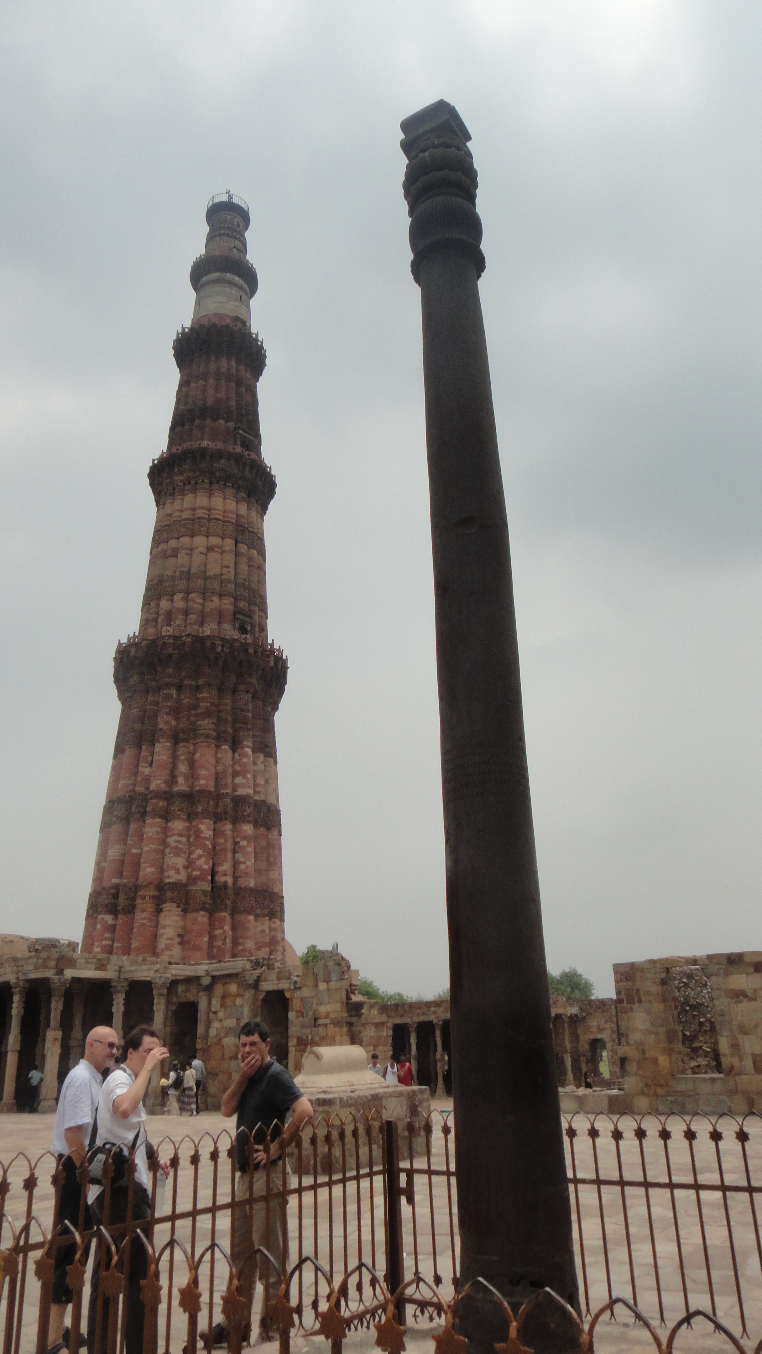 قطب منار